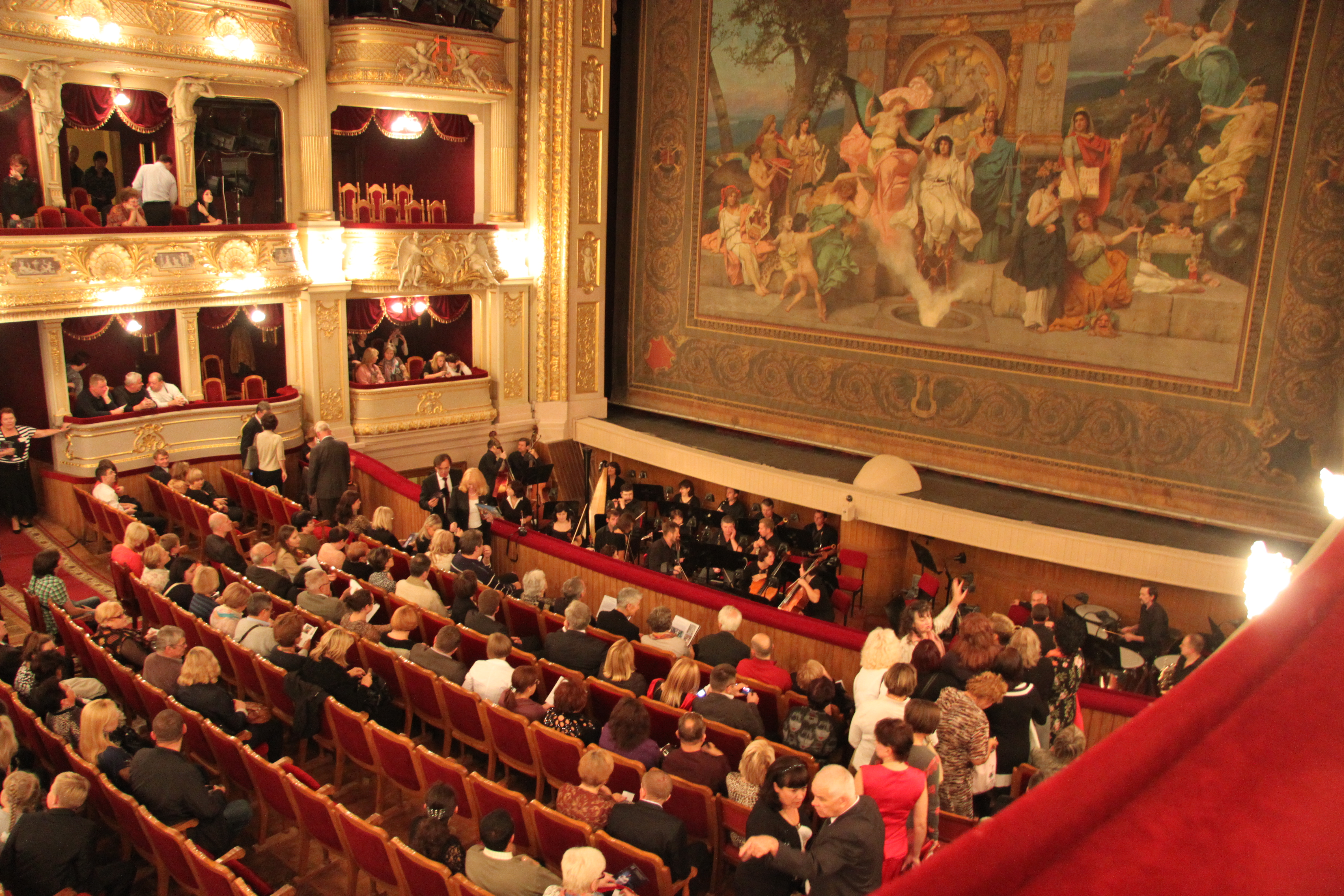 Театр опери та балету, в якому виступали видатні співаки, артисти, композитори світової слави, Львів, Свободи пр., 28